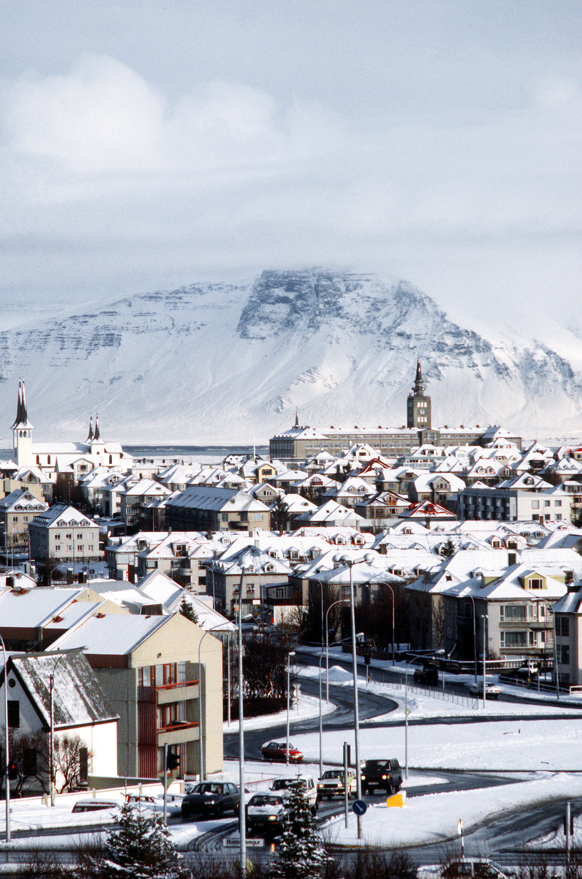 An elevated view of Reykjavik, Iceland.